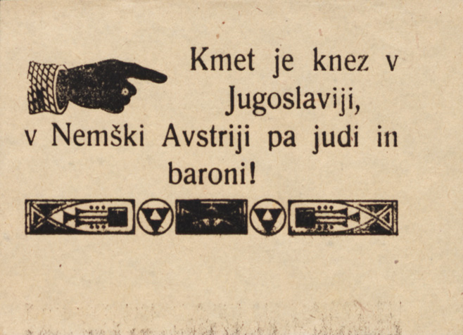 Nalepka ob plebiscitu Kmet je knez v Jugoslaviji, v Nemški Avstriji pa judi in baroni!